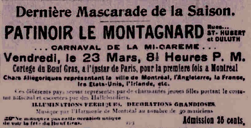 Annonce du défilé sur glace du Bœuf Gras à Montréal le 23 mars 1900, lendemain de la Mi-Carême.